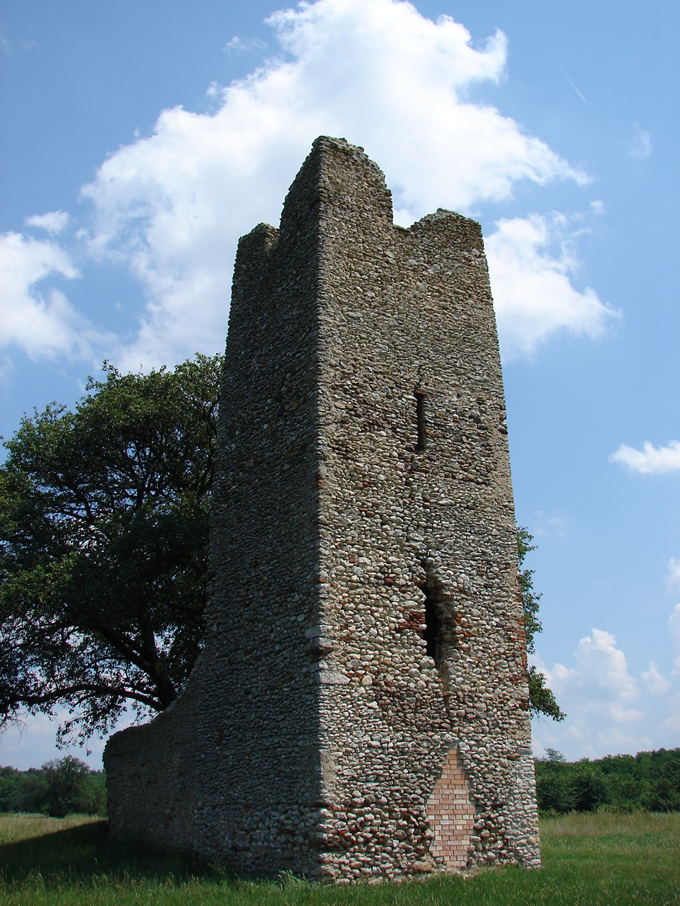 Nagykeszi egykori falu templomának romja, XII-XIII. század